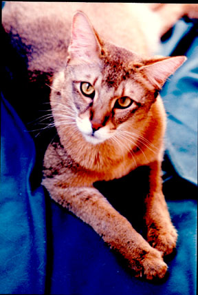 chausie breed name Fugao